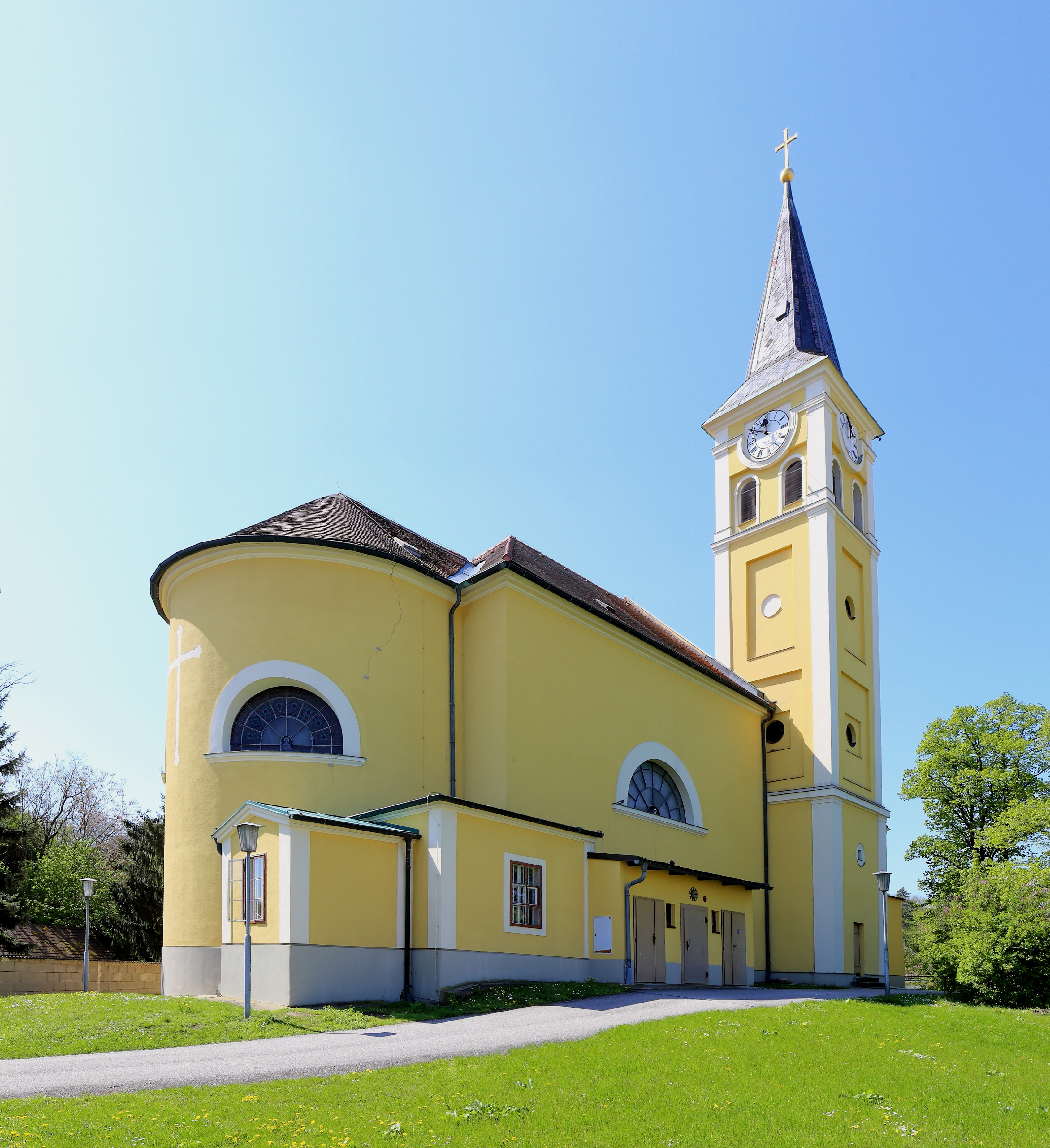 Nordostansicht der römisch-katholischen Pfarrkirche hl. Koloman in der niederösterreichischen Marktgemeinde Ebenthal.Der Sakralbau wurde im 17. Jahrhundert in erhöhter Lage im Südosten des Ortes errichtet. Von 1831 bis 1840 wurde die Kirche umgebaut und erweitert.